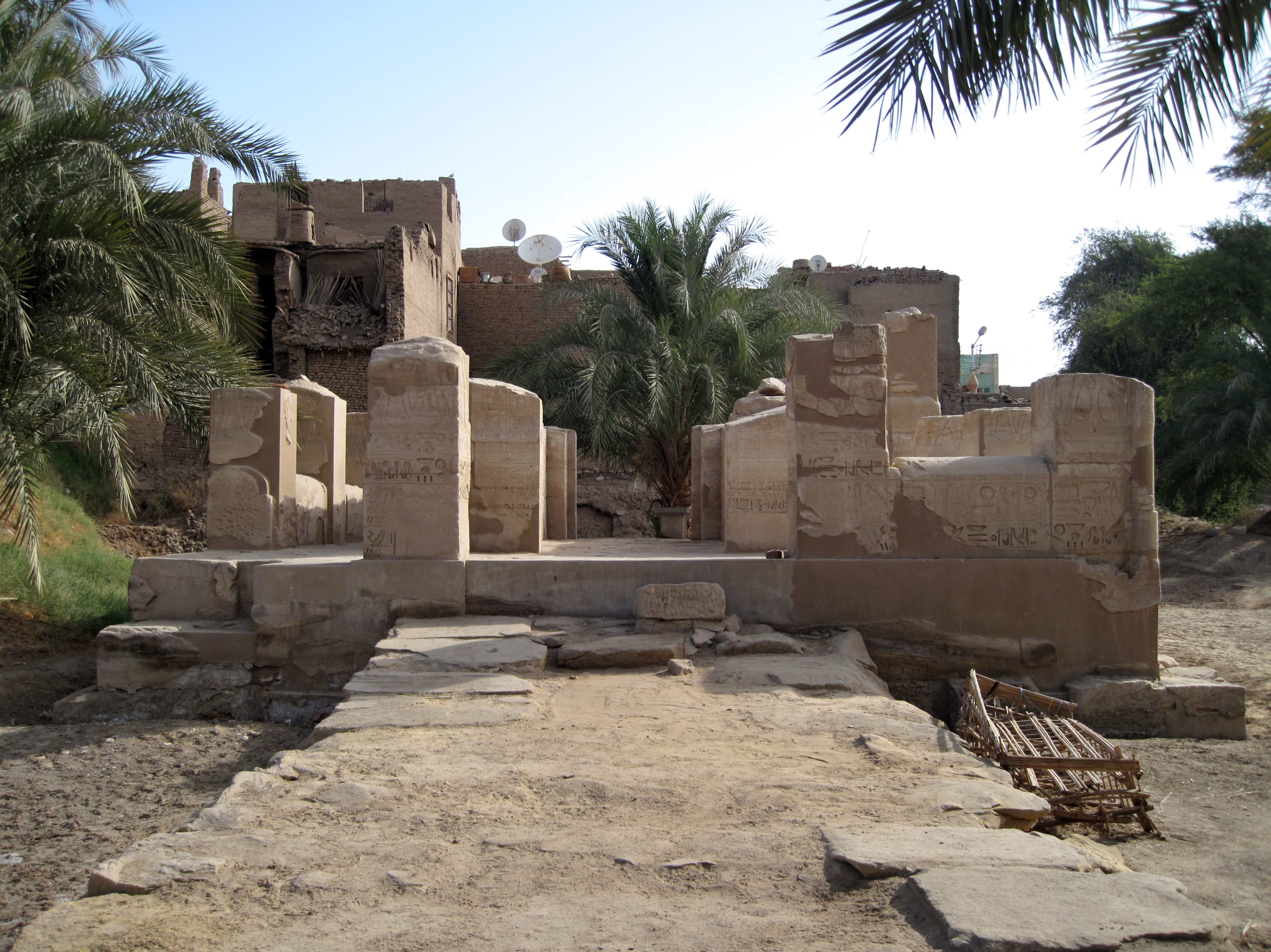 Ehemalige Barkenstation Thutmosis III. am Month-Tempel von el-Tod, Ägypten